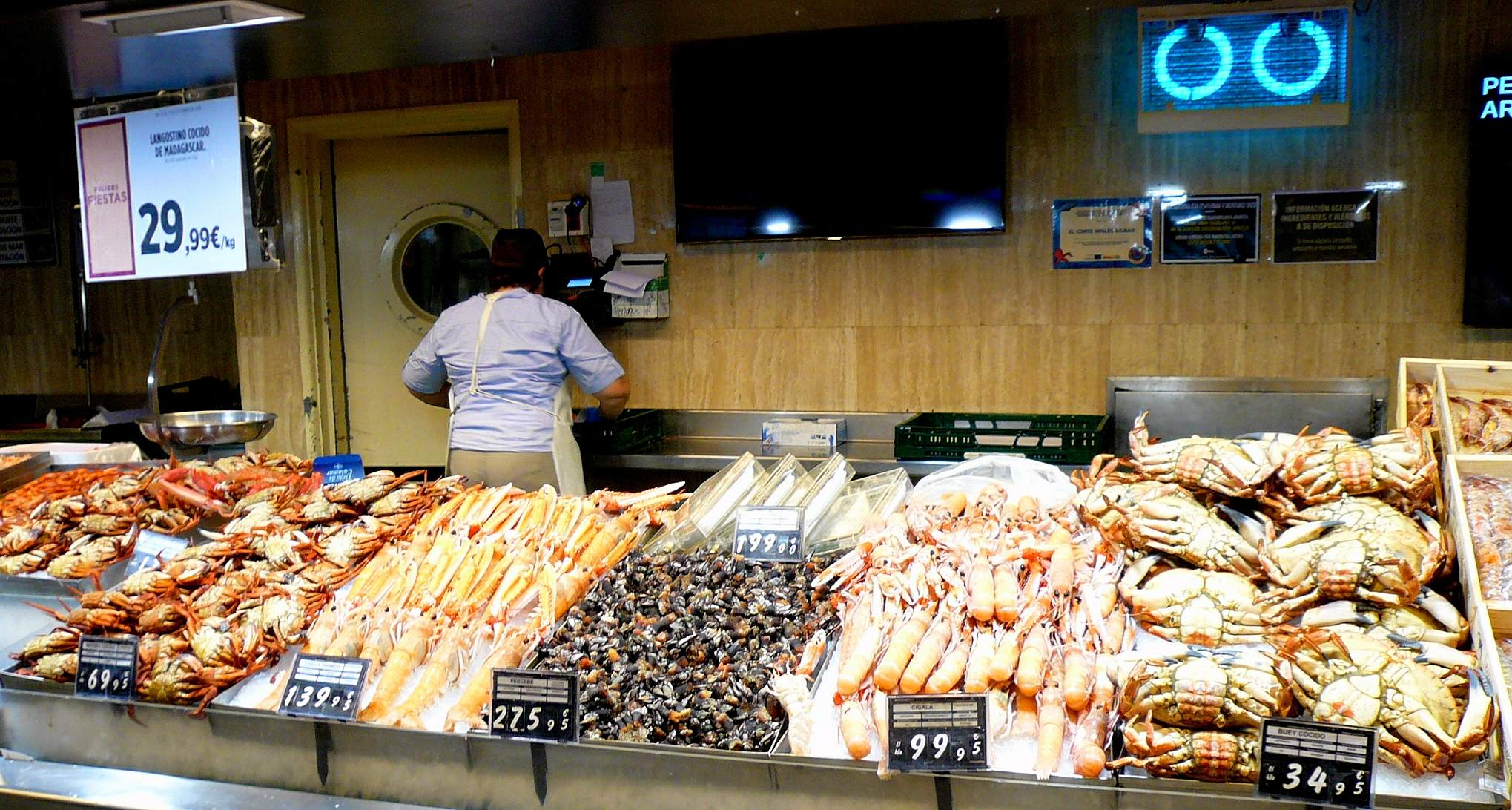 Supermercado de El Corte Inglés de Bilbao